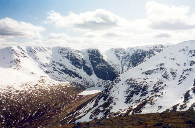 Coire Ardair, Creag Meagaidh, Loch Laggan